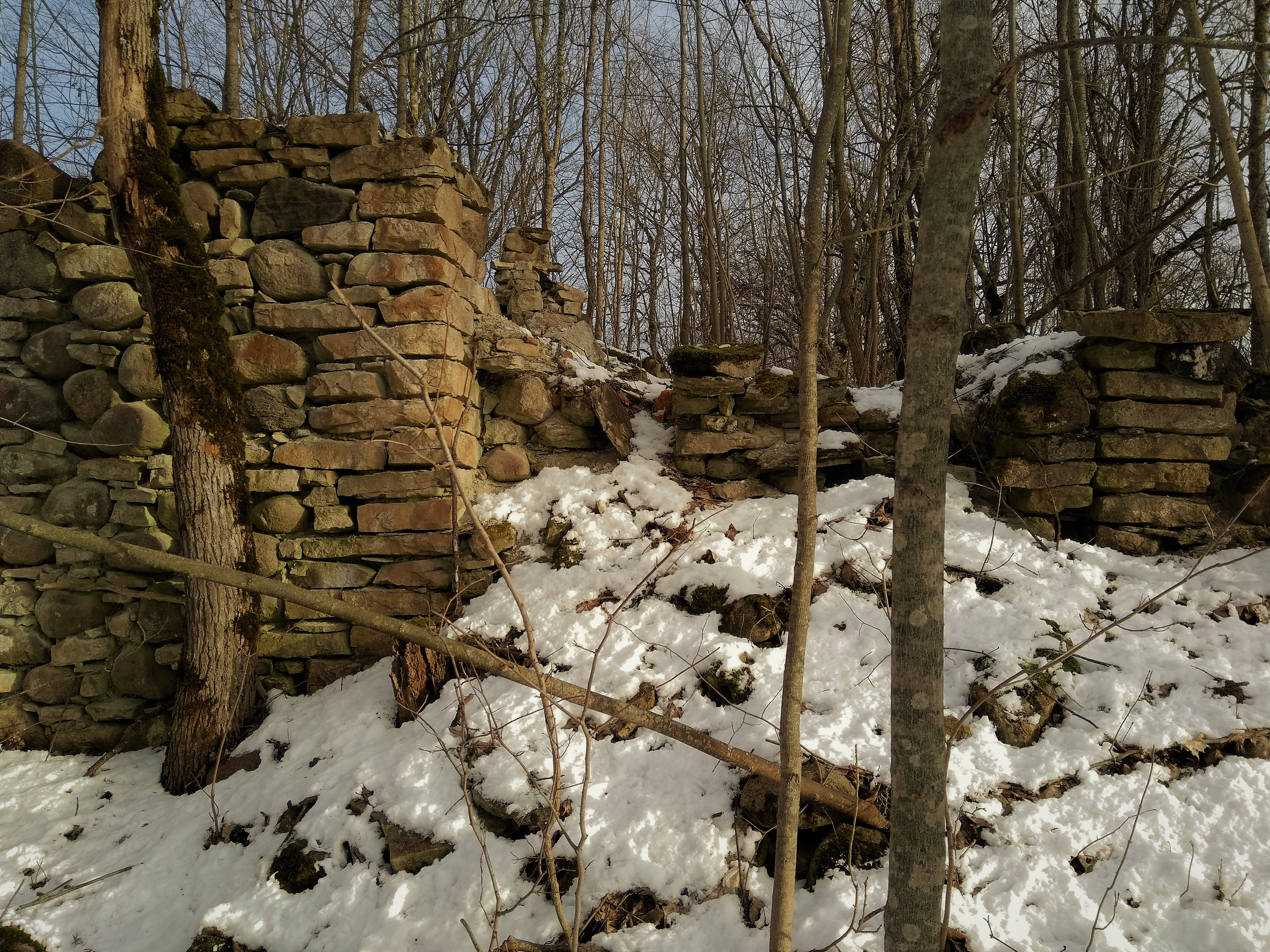 Vaade Paadremaa mõisa peahoone soklikorruse loodekülje müürile. Müüriavaus meenutab kinnimüüritud väravaava. Vaade loodest. Sookalda küla